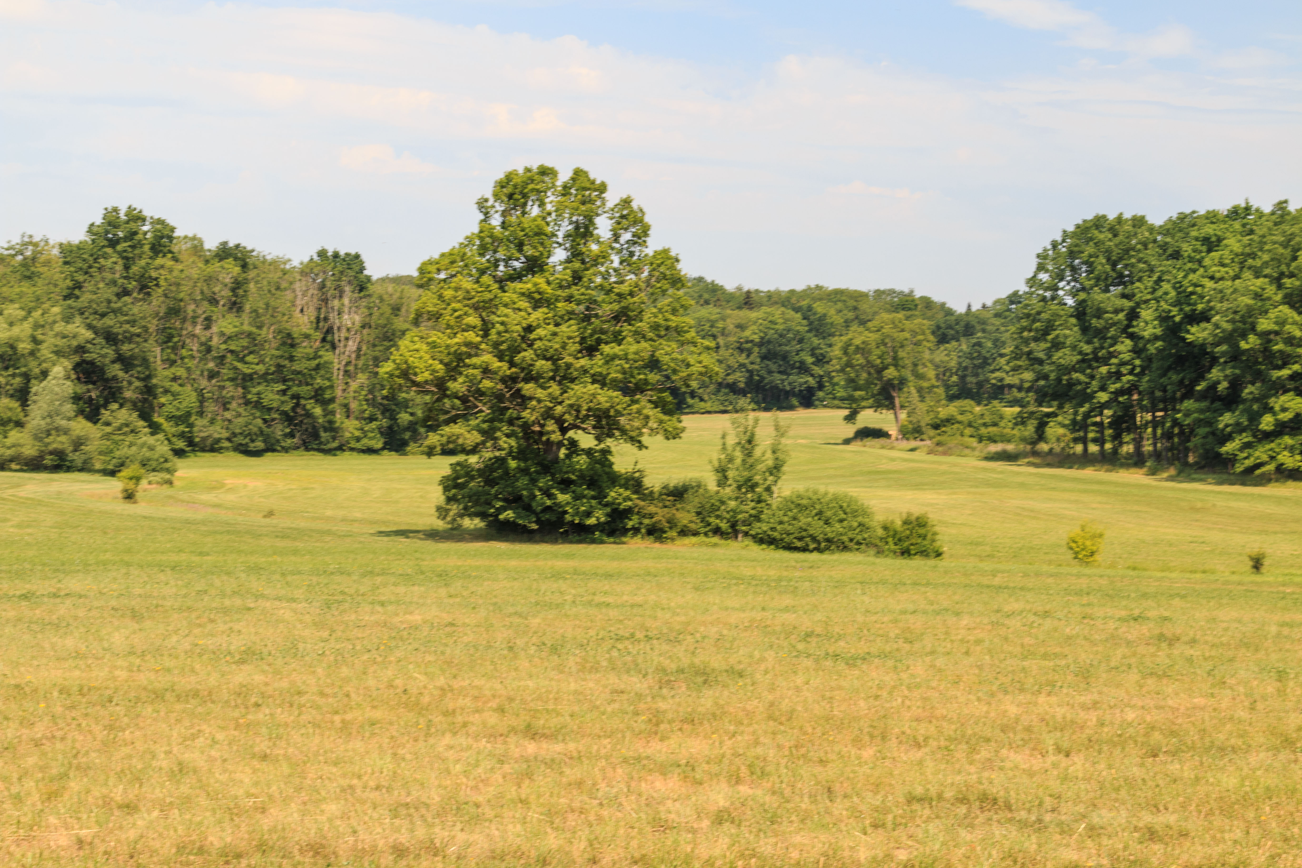 PR Miletínská bažantnice Project: Chráněná území.